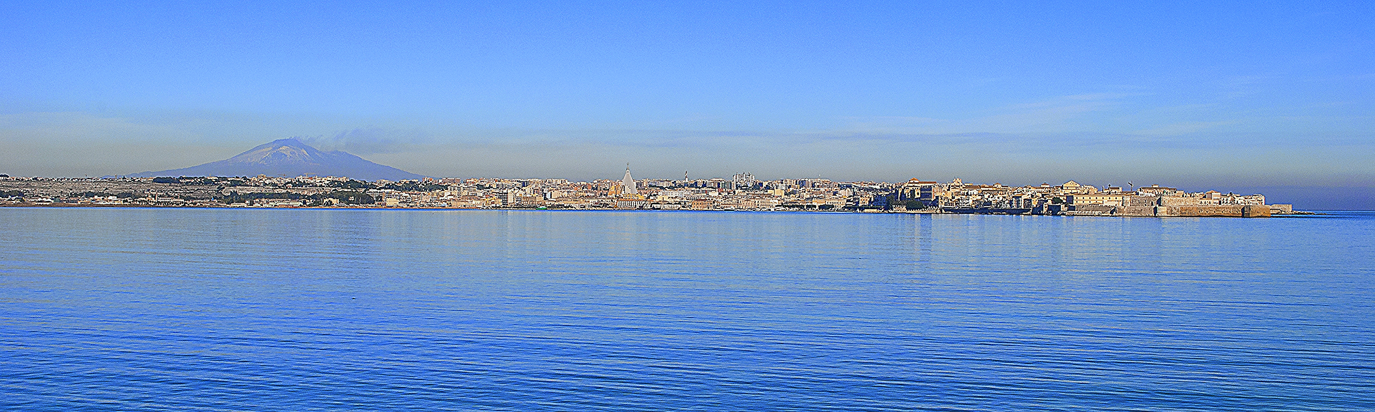 Veduta di Siracusa e dell'Etna